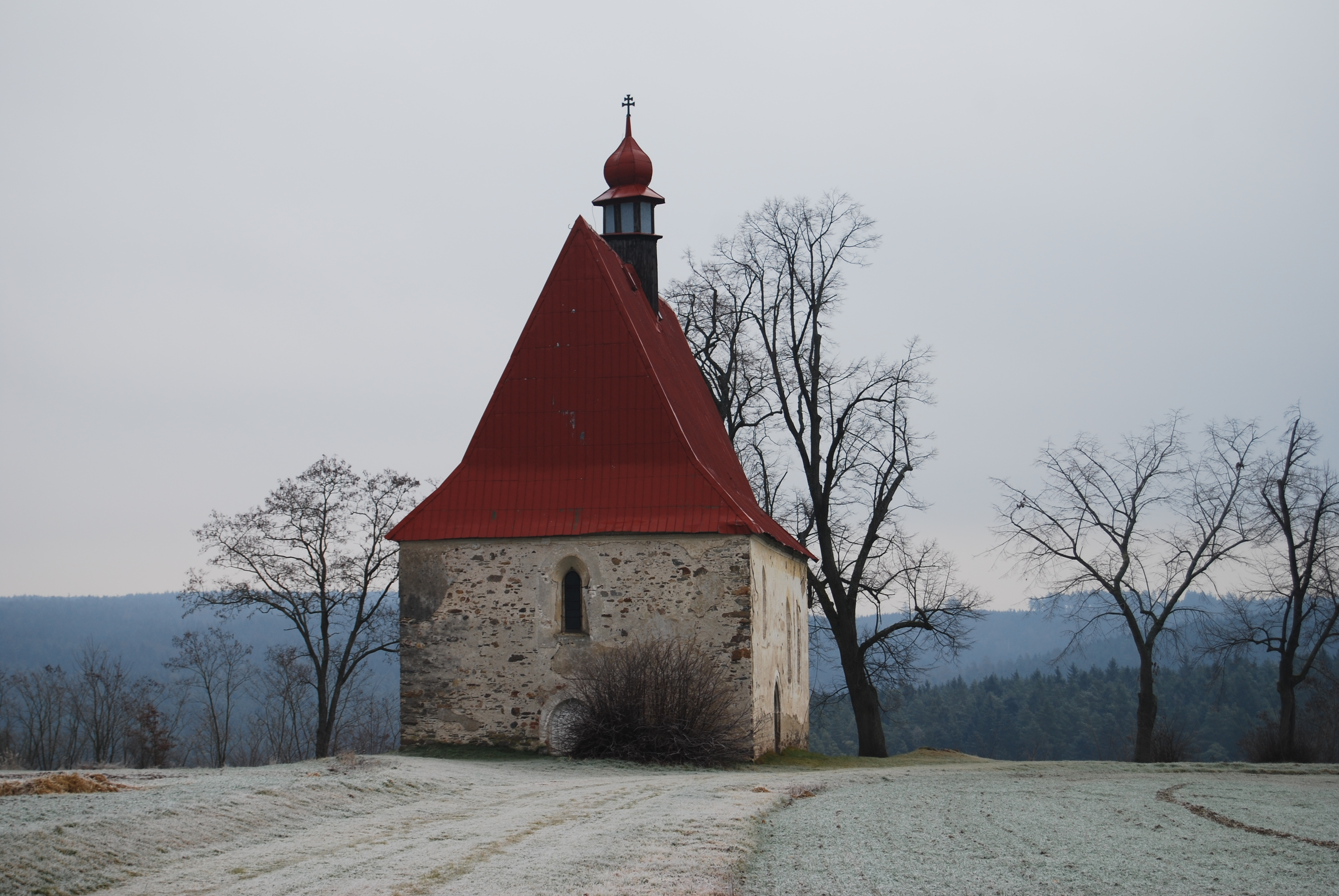 Kostel Nanebevzetí Panny Marie. Dobronice u Bechyně se nachází v okrese Tábor, kraj Jihočeský. Česká republika. - Google Maps - Google Earth